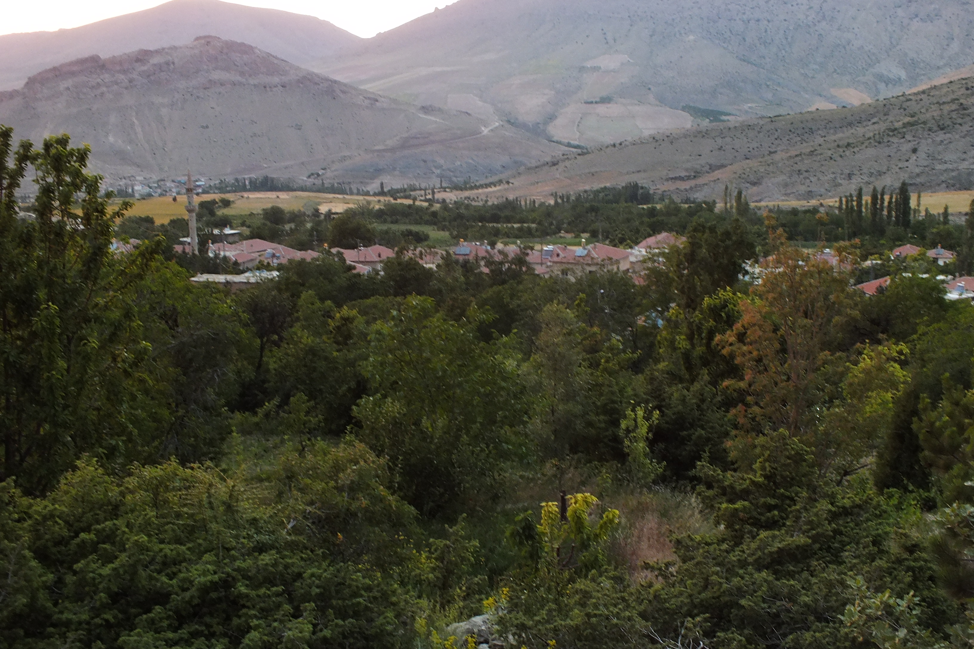 EROL ÖZDEŞ ÇAKILLAR KÖYÜ